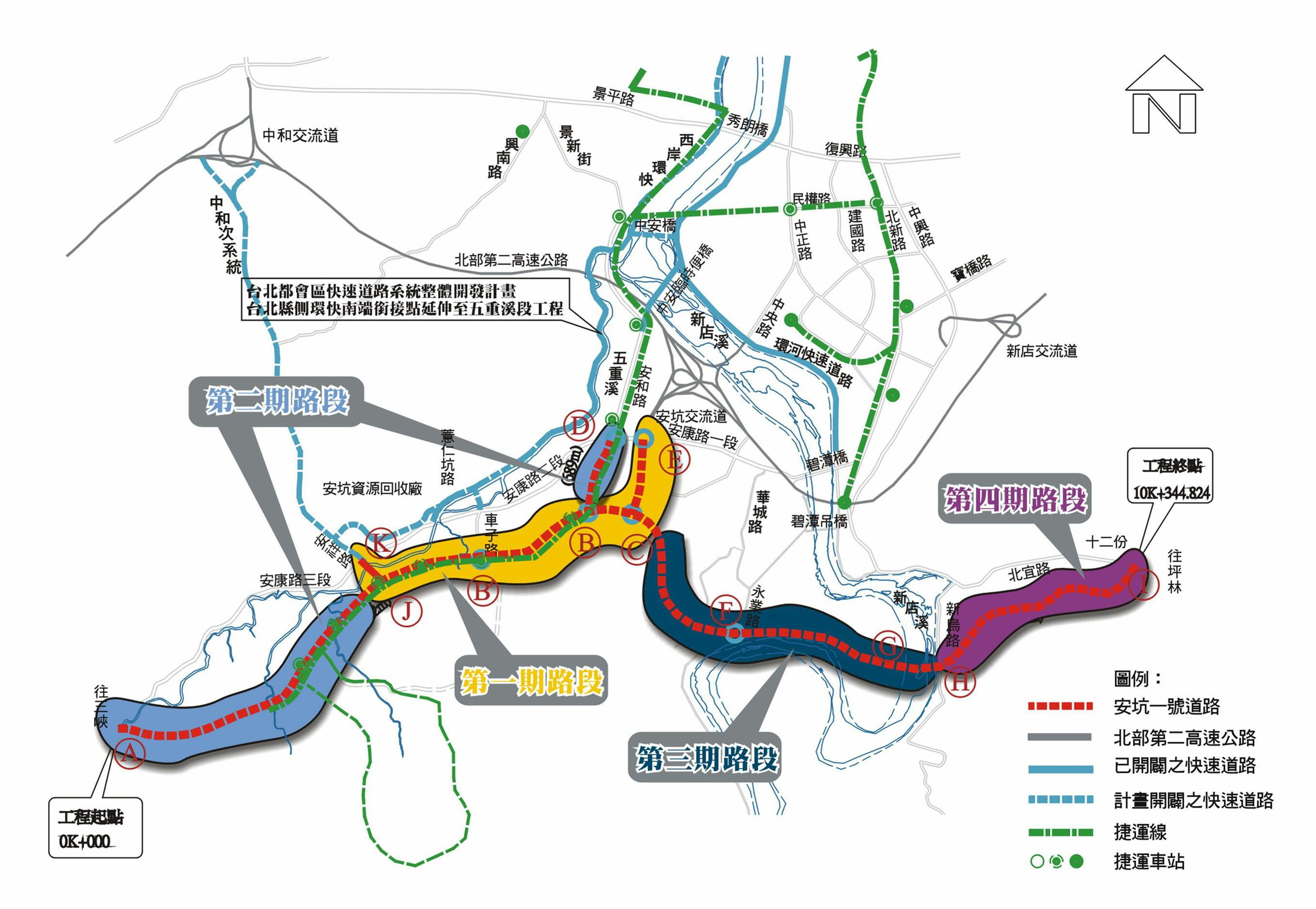 中文（台灣）: 新店安坑一號道路工程概要圖。